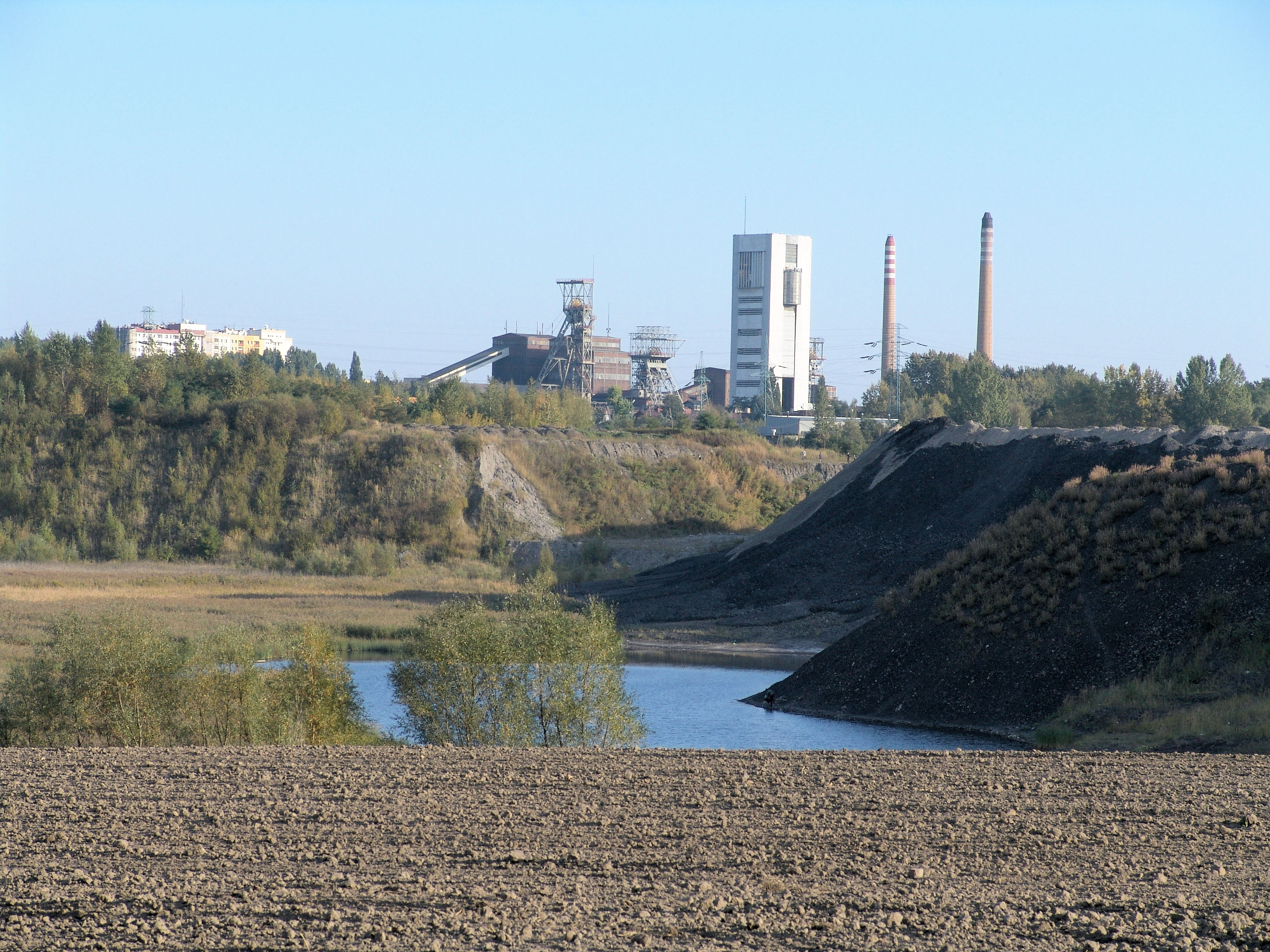 Kopalnia Centrum